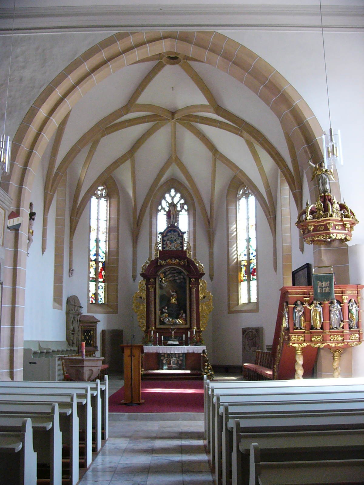 Ansichten der Johanneskirche in Kasendorf